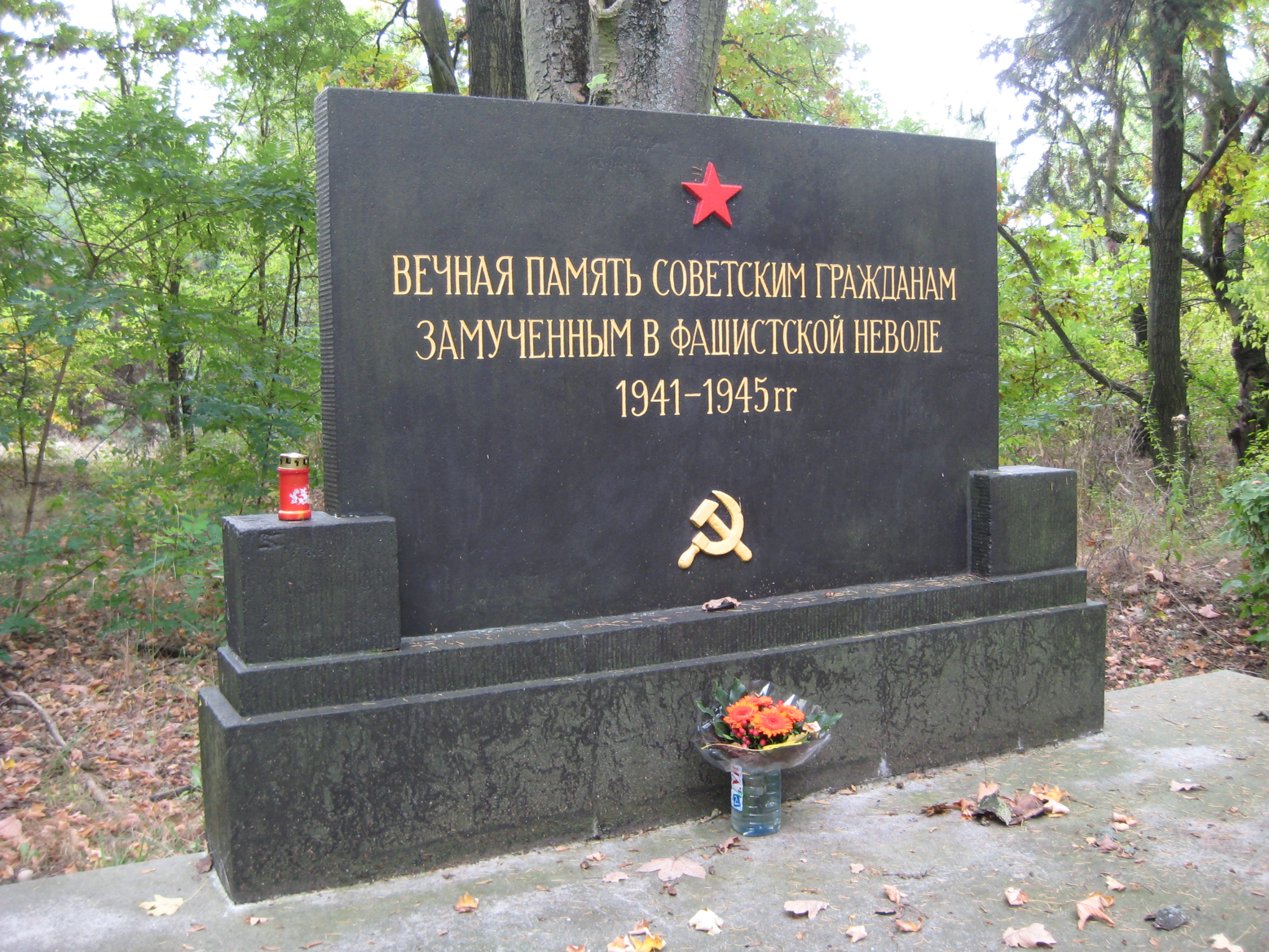 Luckenwalde - Stalag IIIa